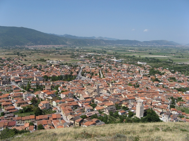 Vista di Trasacco (provincia dell'Aquila) dall'alto